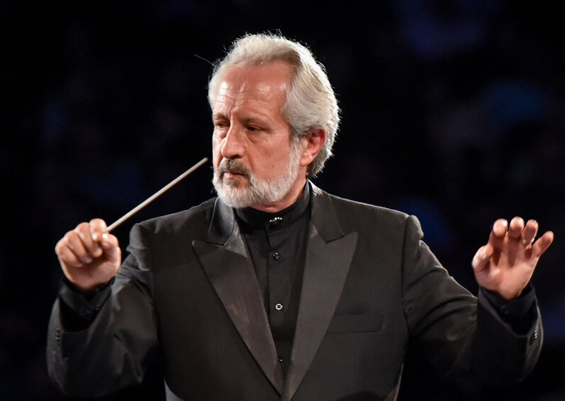 کنسرت موسیقی وداع به رهبری همایون رحیمیان مرکز همایش‌های برج میلاد تهران ۶ مهر ۱۳۹۸